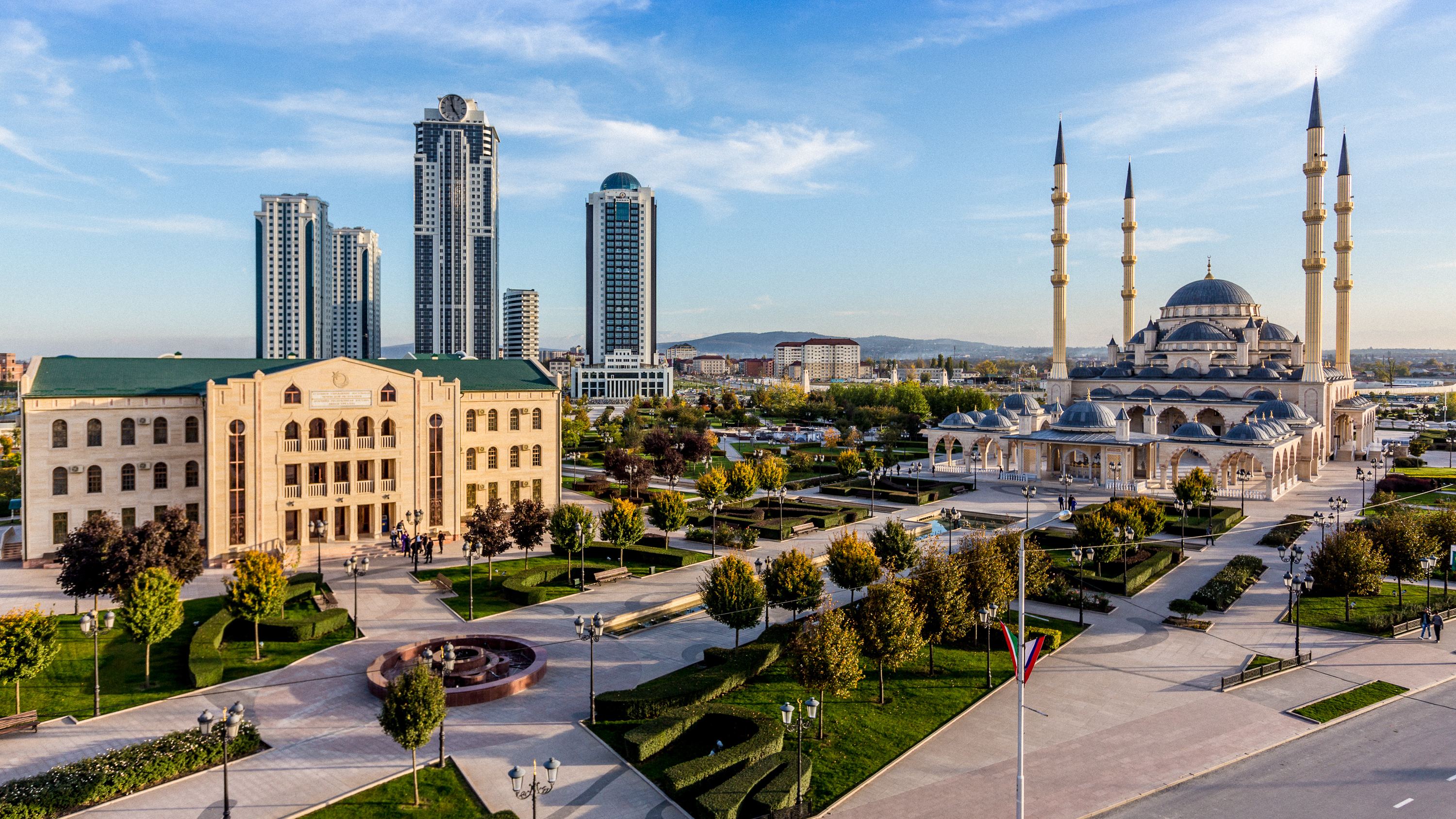 Мечеть "Сердце Чечни"